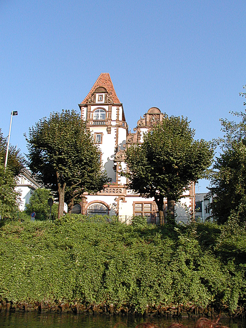 Straßburg, 2 rue Geiler, 10 quai Rouget de Lisle, Palaio Alsatia